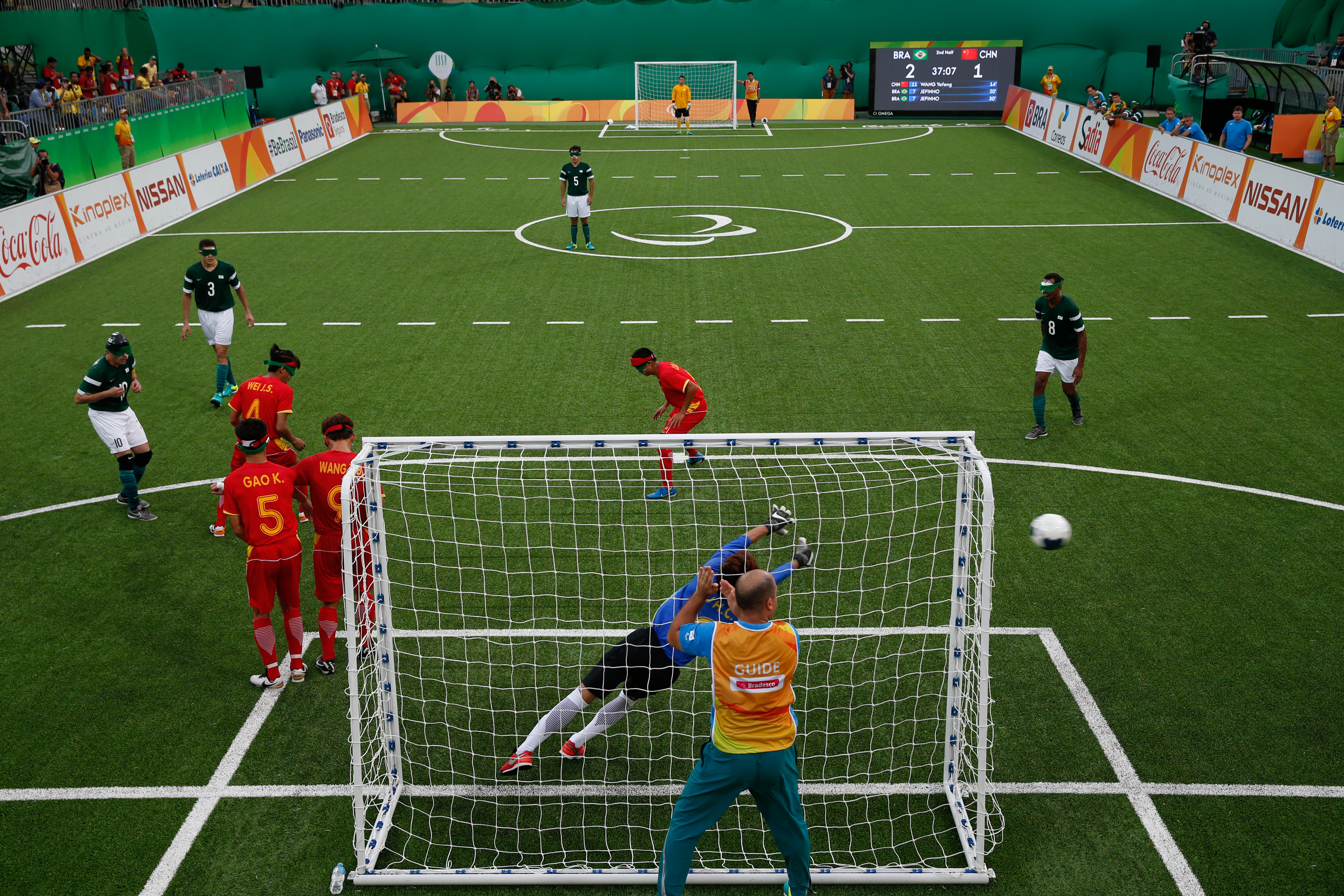 Rio de Janeiro - Brasil vence a China de virada por 2 a 1 e vai à final do futebol de 5 nos Jogos Paralímpicos Rio 2016 (Fernando Frazão/Agência Brasil)